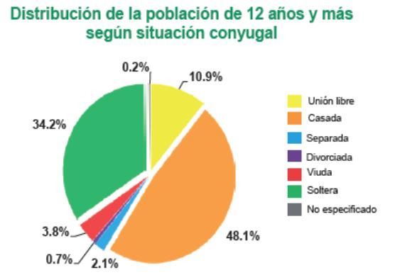 Situación Conyugal de los apaseenses